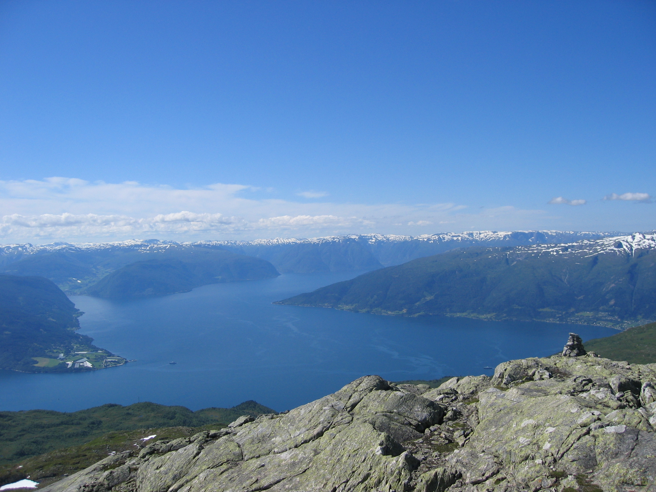 Sognefjorden sett frå Hestfjellet i Leikanger kommune. Neset på hi sida av fjorden til høgre i biletet er Vangsnes. Bak det ser ein innover til Viksøyri. Neset midt i biletet er Målsnes i Balestrand kommune. På hi sida av fjorden, bak Målsnes, ser ein innlaupet til Arnafjorden. Til høgre, på Målsnessida, ser ein delar av kommunesenteret Holmen. Dragsvik ligg nedom/bakom den vesle varden til høgre.